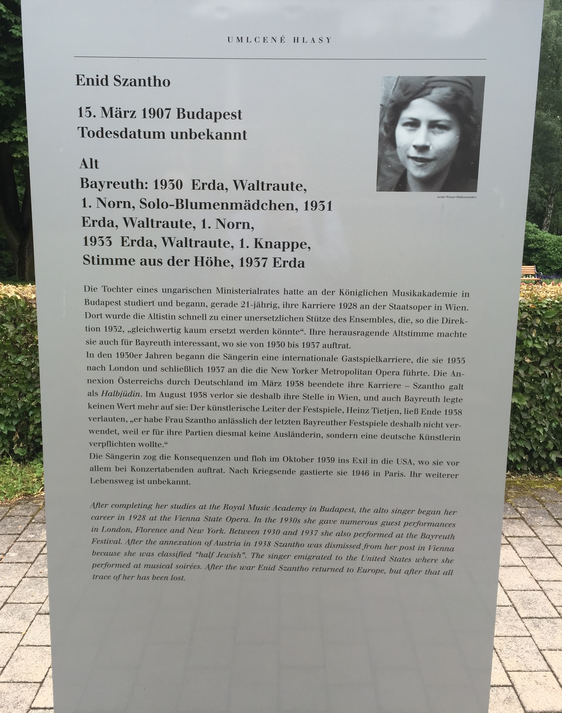 "Verstummte Stimmen - Die Bayreuther Festspiele und die 'Juden' 1876 bis 1945", Ausstellung 2016